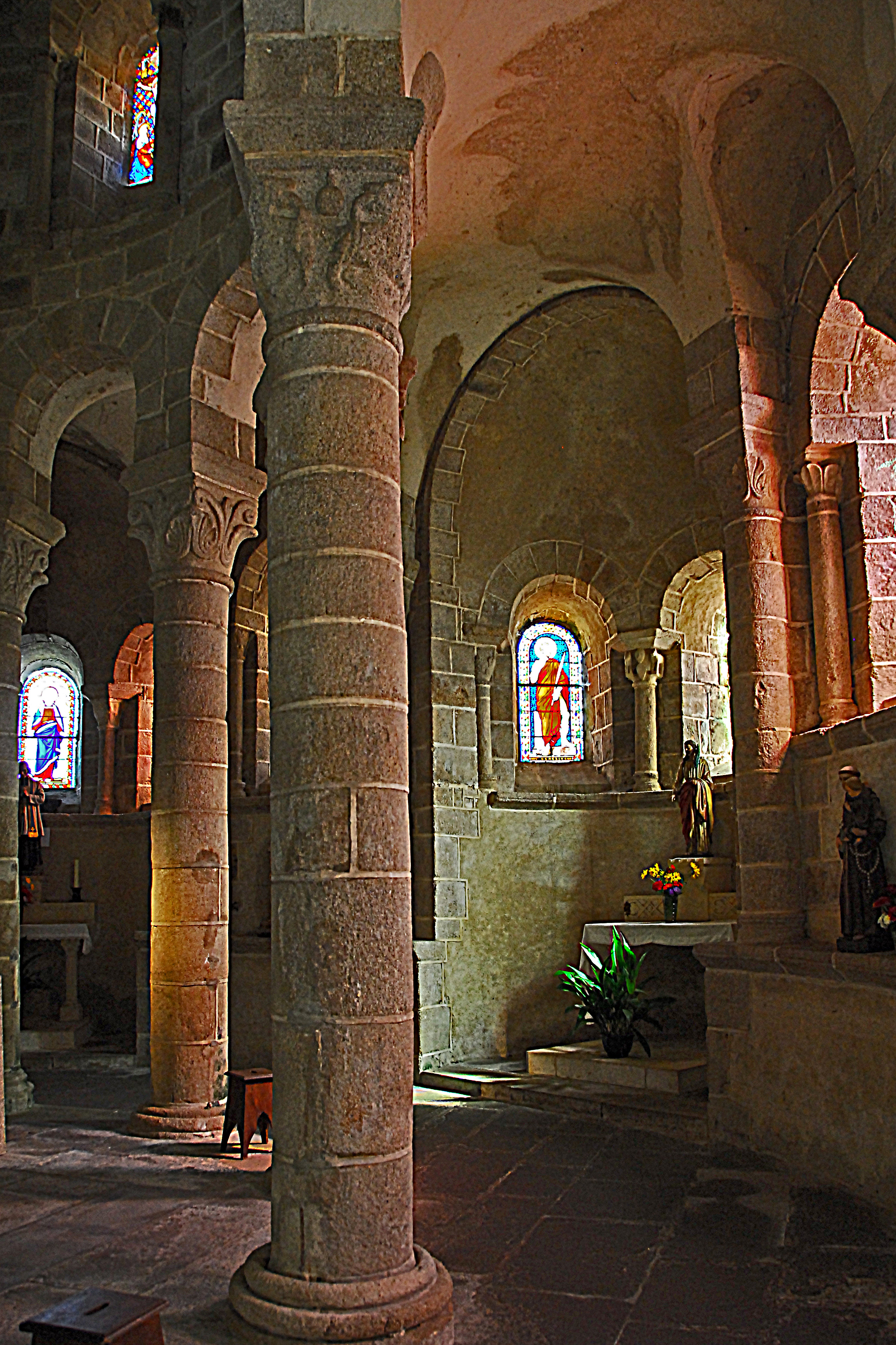 N.-D. de Châtel-Montagne, Chorumgang u. Kapelle